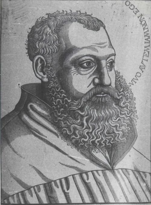 Peter Pavel Vergerij (1498-1565), Slovene writer and bishop.